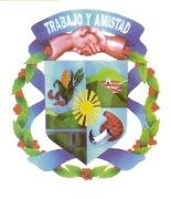 escudo de taminango